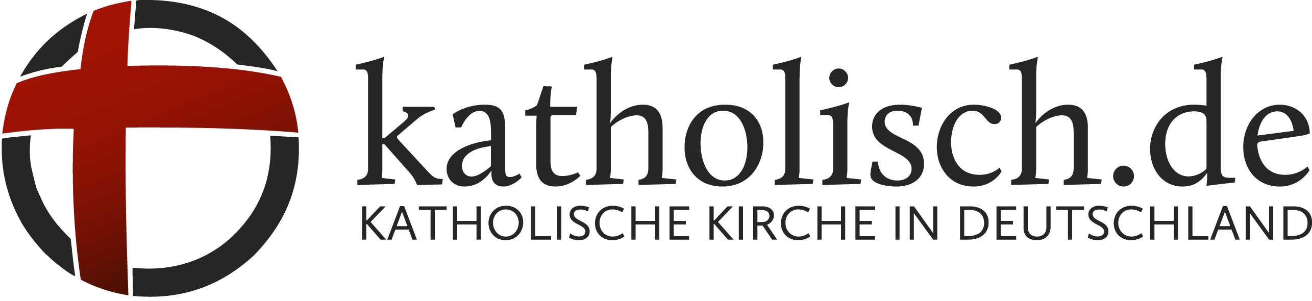 Das Logo von katholisch.de (Urheber: katholisch.de)